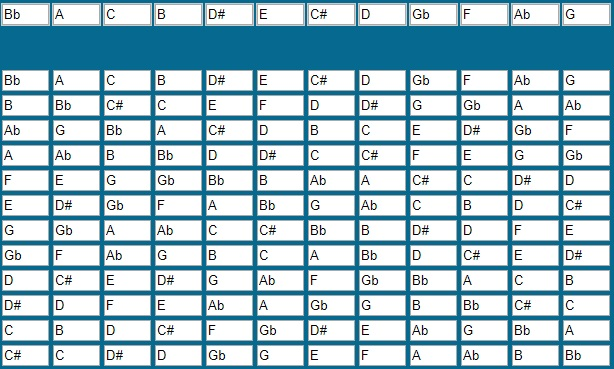 La matriz dodecafónica del cuarteto de cuerdas opus 28 de Anton Webern. Generado con